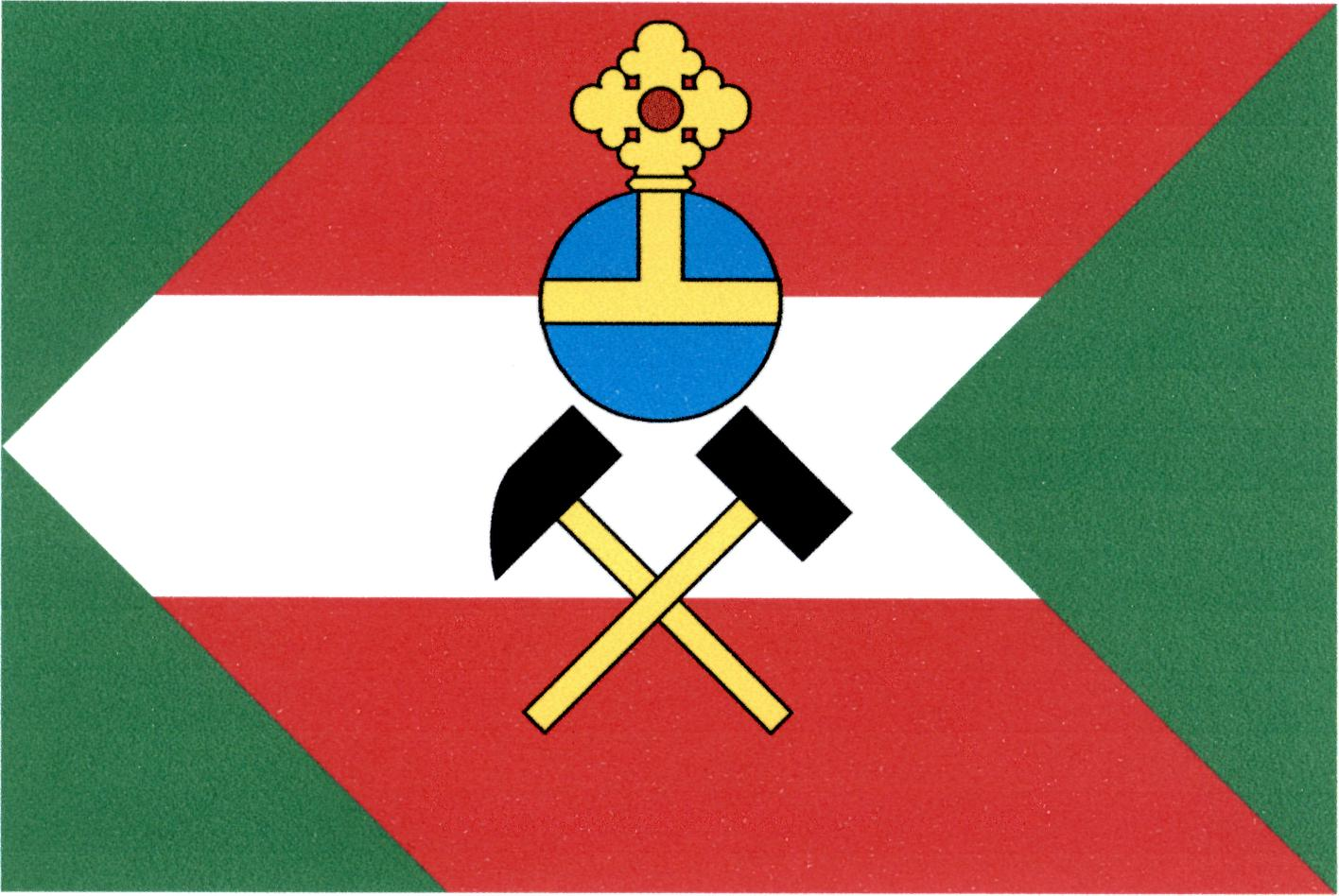 Vlajka obce Kryštofovy Hamry